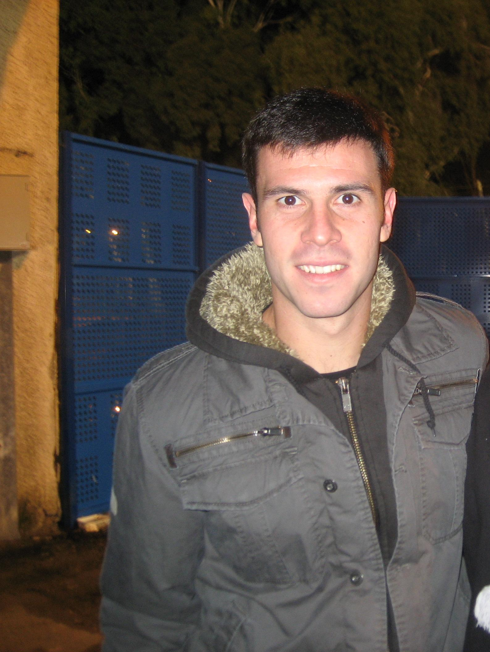 Argentine Israeli footballer Roberto Colautti